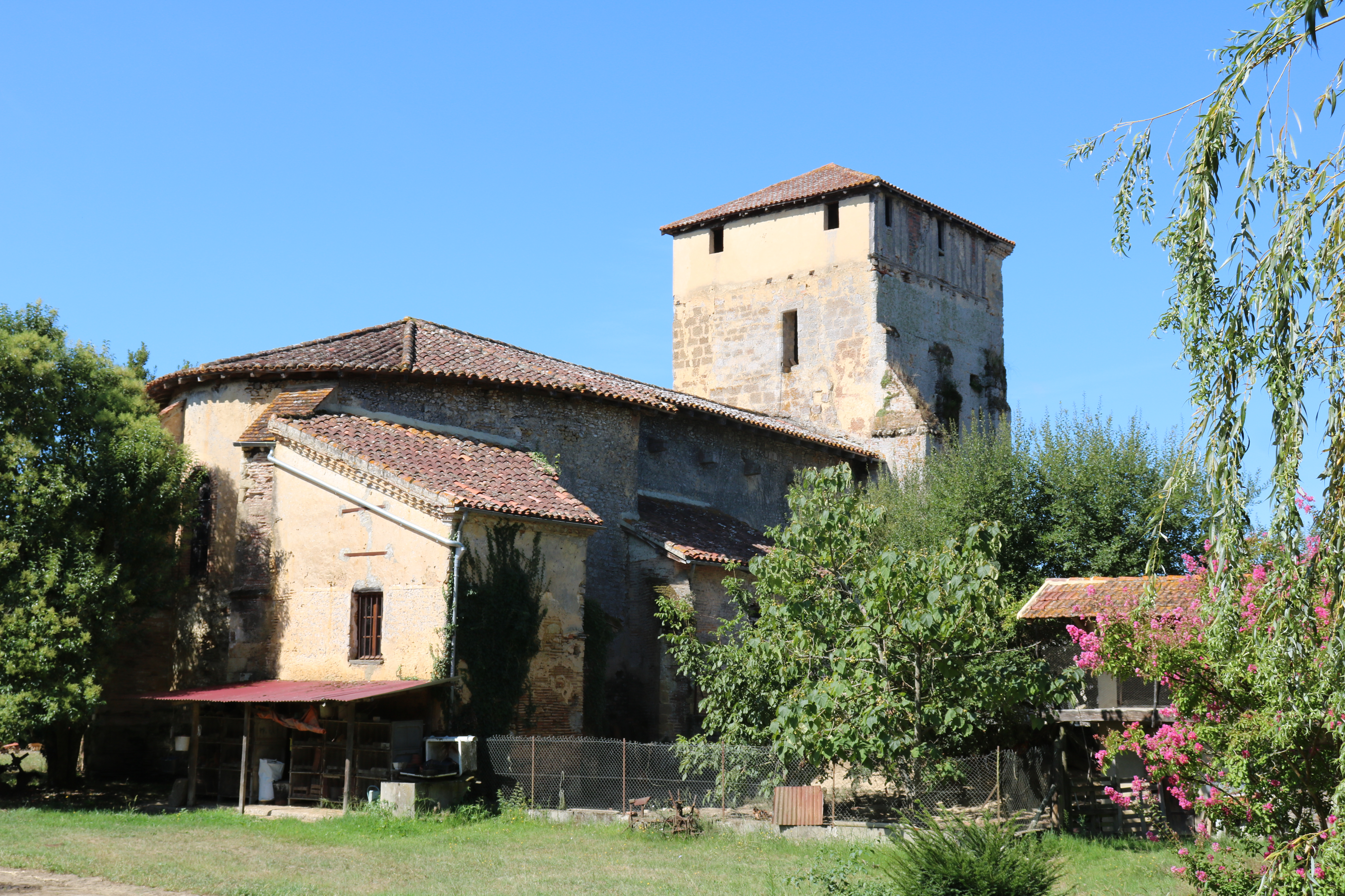 Vue de l'église de la commune de SION (France - Région Occitanie - Département du Gers)